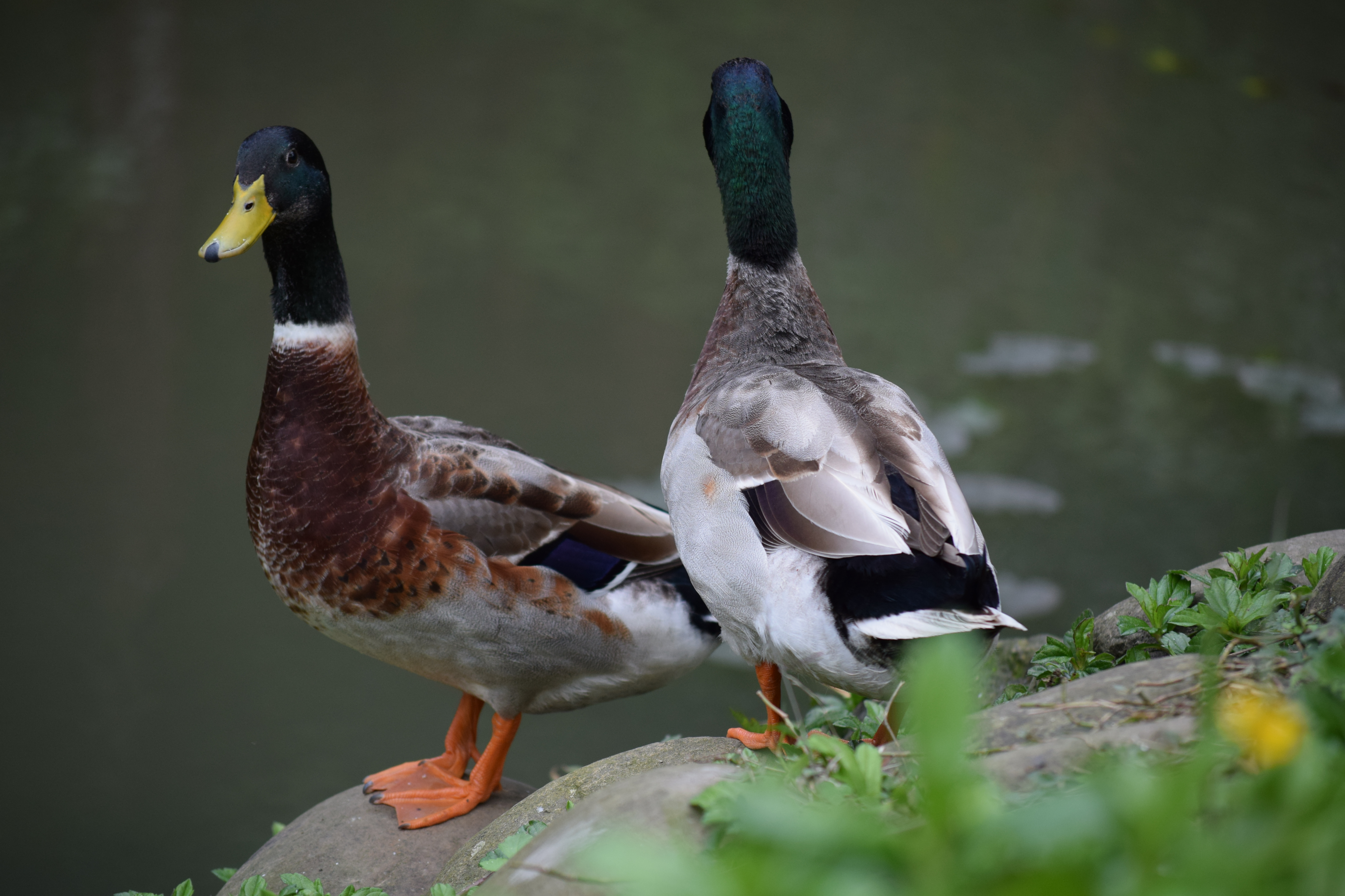 麗山校鴨 綠頭鴨 在生態池旁邊